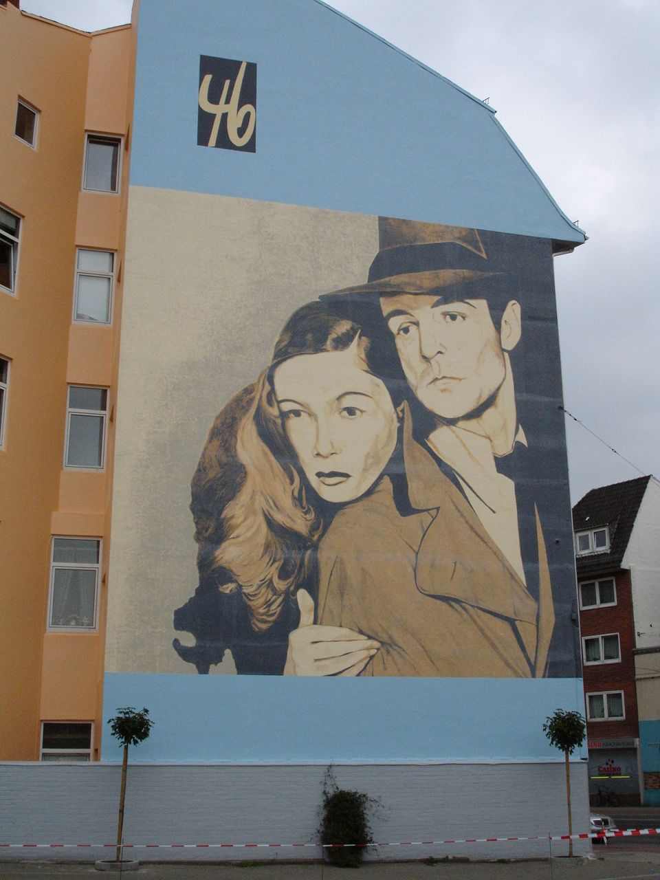 Wandmalerei beim früheren Standort des Kommunalkino Bremen (als "Kino 46") an der Waller Heerstraße. Zu sehen sind Veronica Lake und Alan Ladd in einem Still aus "Die Narbenhand"